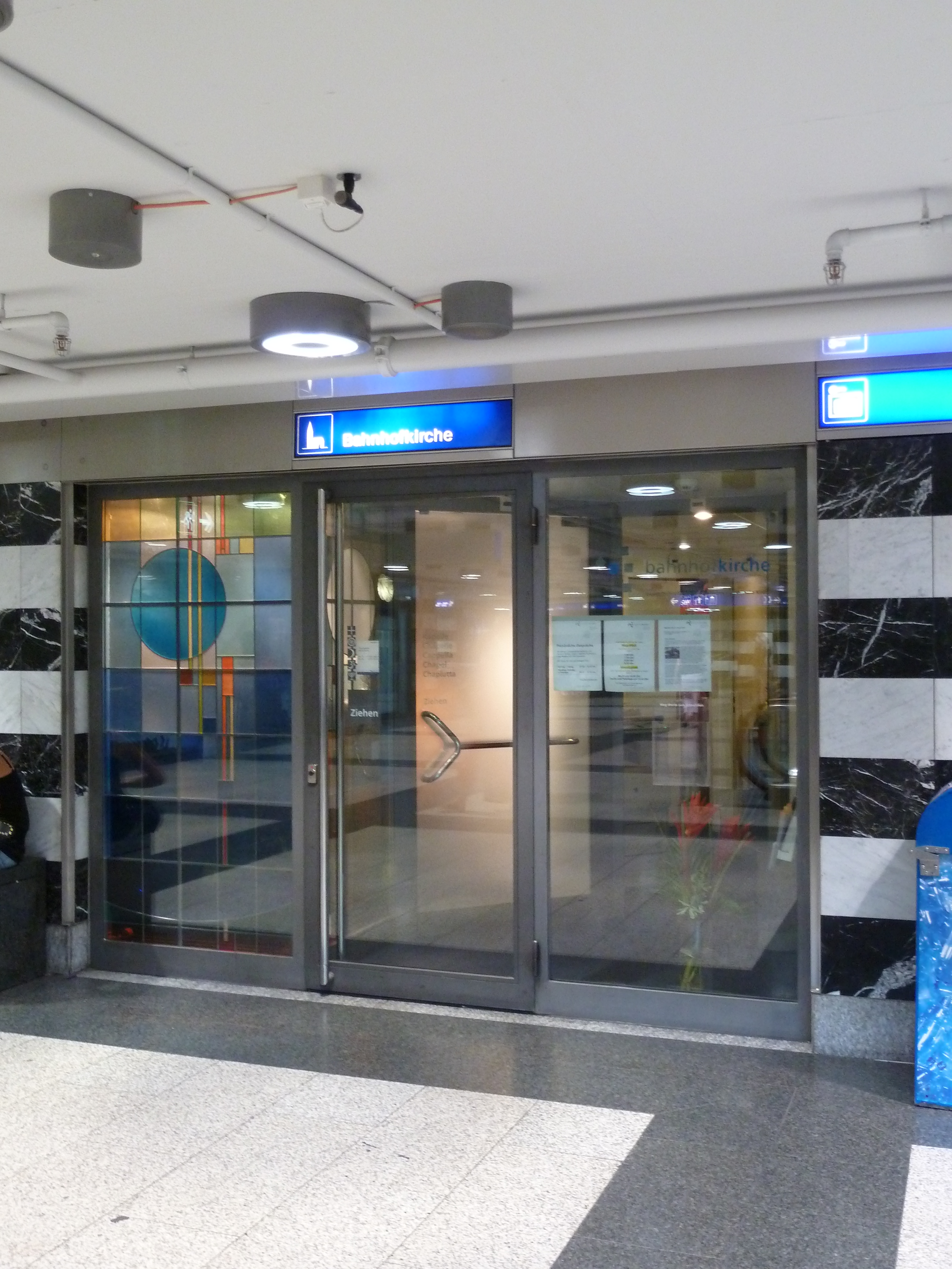 Eingangsbereich der Zürcher Bahnhofskirche